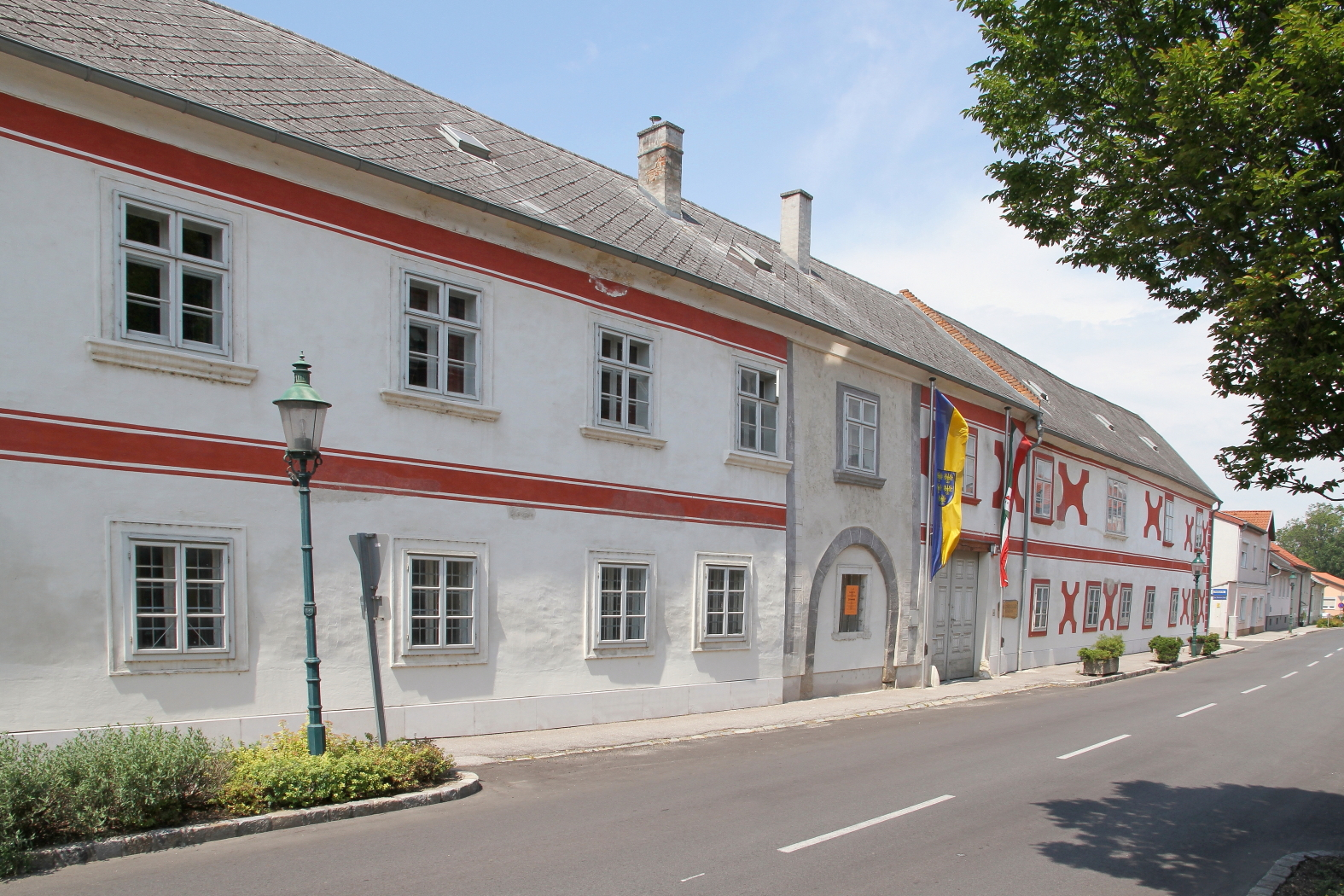 Der sogenannte Rother Hof in der niederösterreichischen Marktgemeinde Pottendorf.